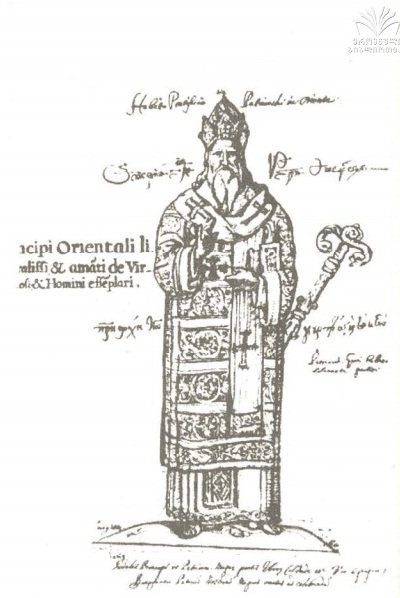 მალაქია II (მალაქია I გურიელი)